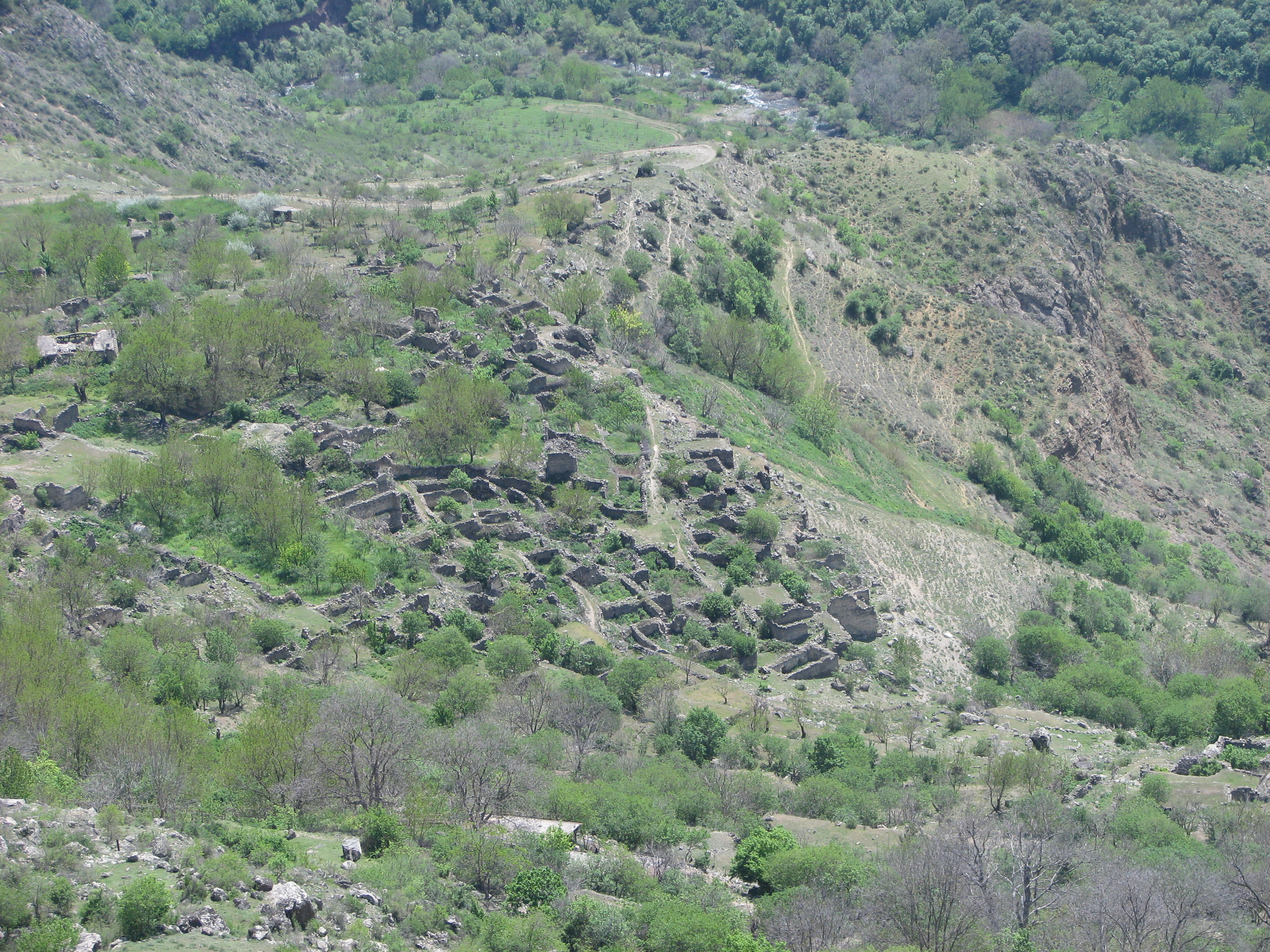 Հին Հալիձորի ավերակները 54/2